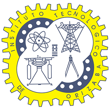 "ITO"